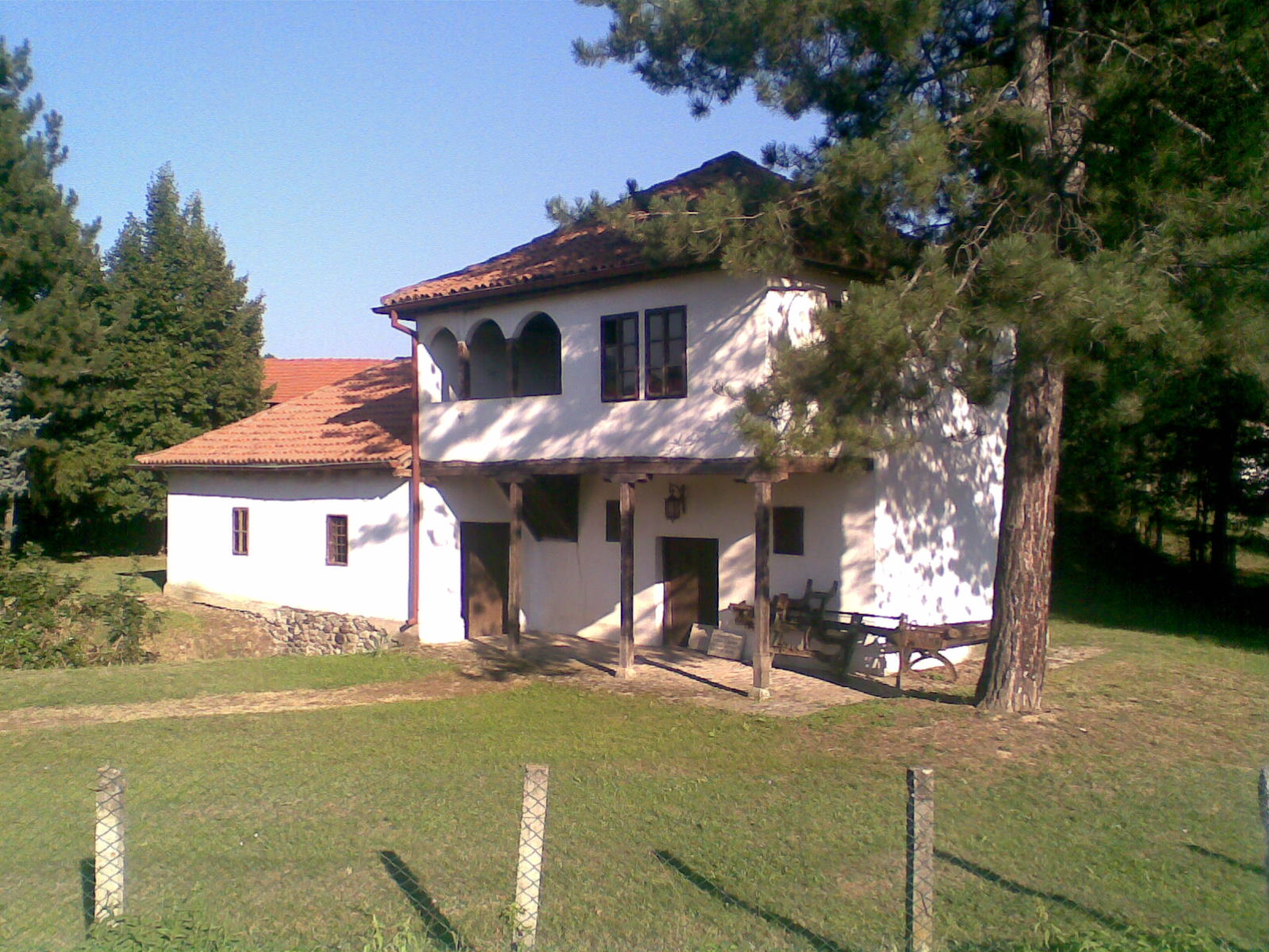 Sliku sam slikao licno prosle godine. Ovo je muzej tekstilne industrije u selu Strojkovcu i ujedno simbol naseg sela. Bio bih Vam zahvalan ako bi ova slika bila postavljena kao osnovna slika vase stranice - Strojkovce :)